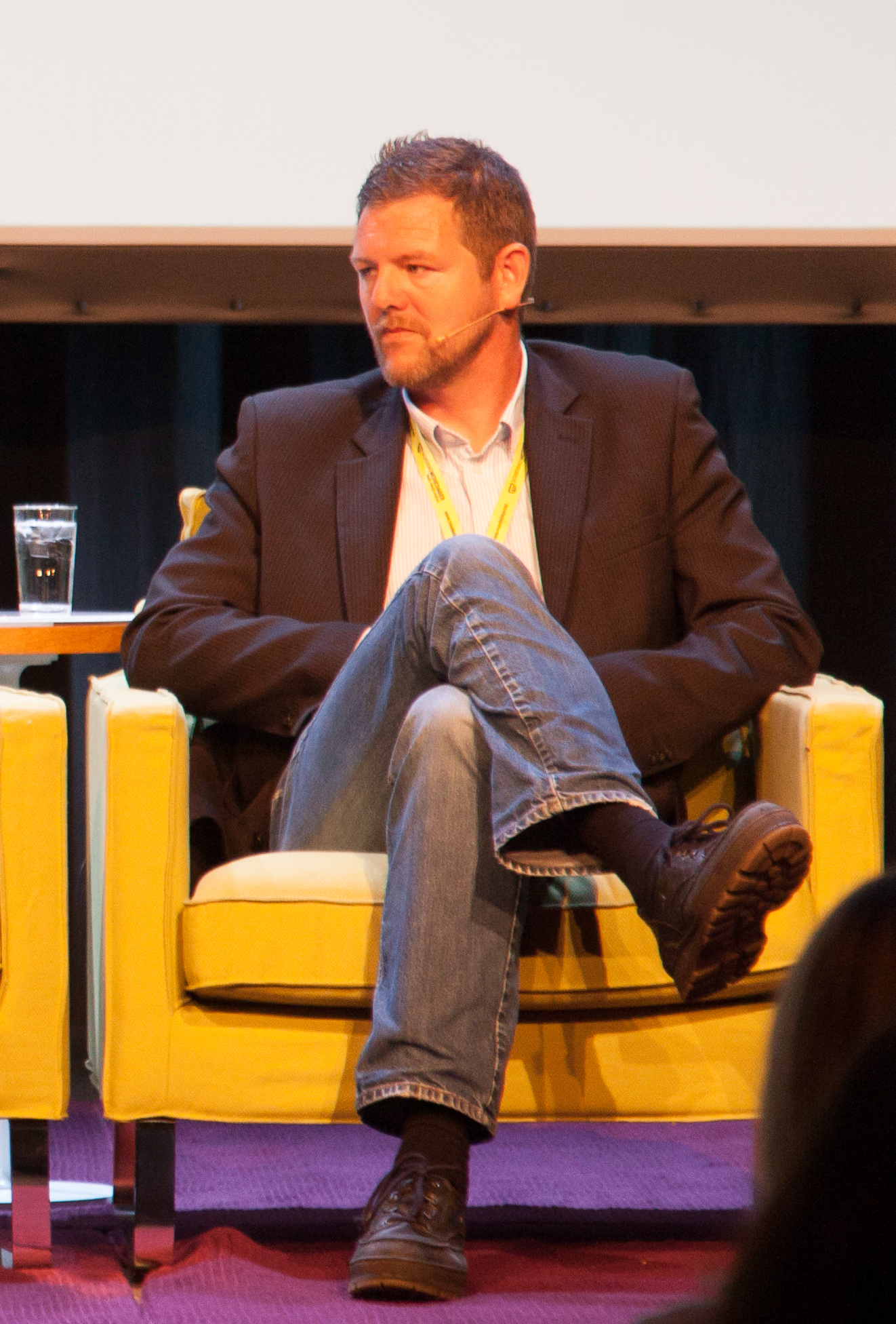 Foto : Kjetil Greger Pedersen/Nordiske Mediedager